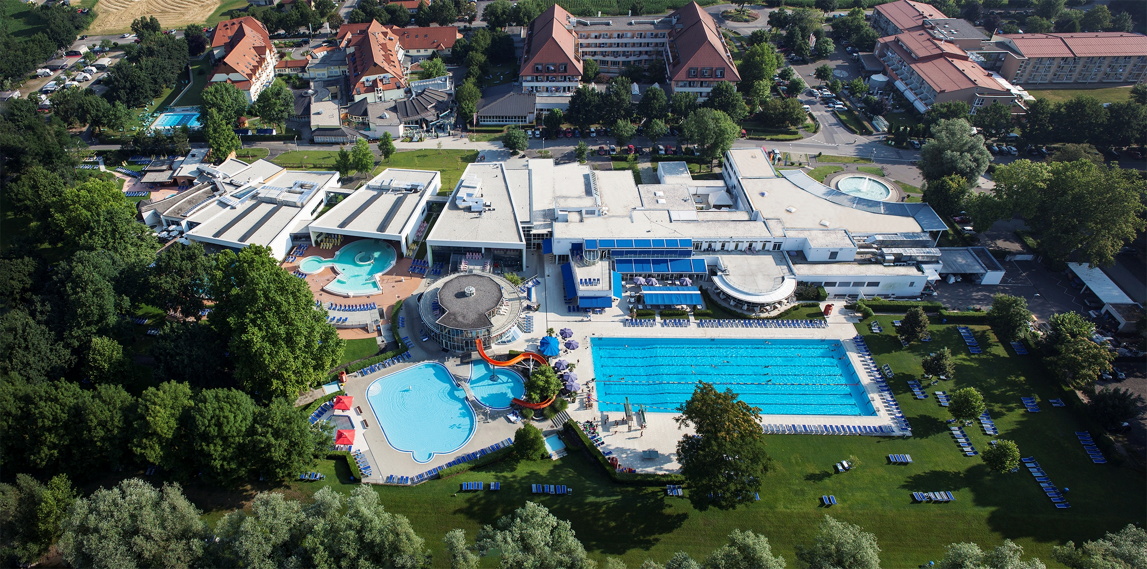 Die Parktherme Bad Radkersburg bietet auf 2.700 m2 Wasserfläche 12 Thermal- bzw. Süßwasserbecken sowie Tauchbecken. Besonders ist das 50 Meter Sportbecken - Olympia-Becken mit 8 Bahnen.